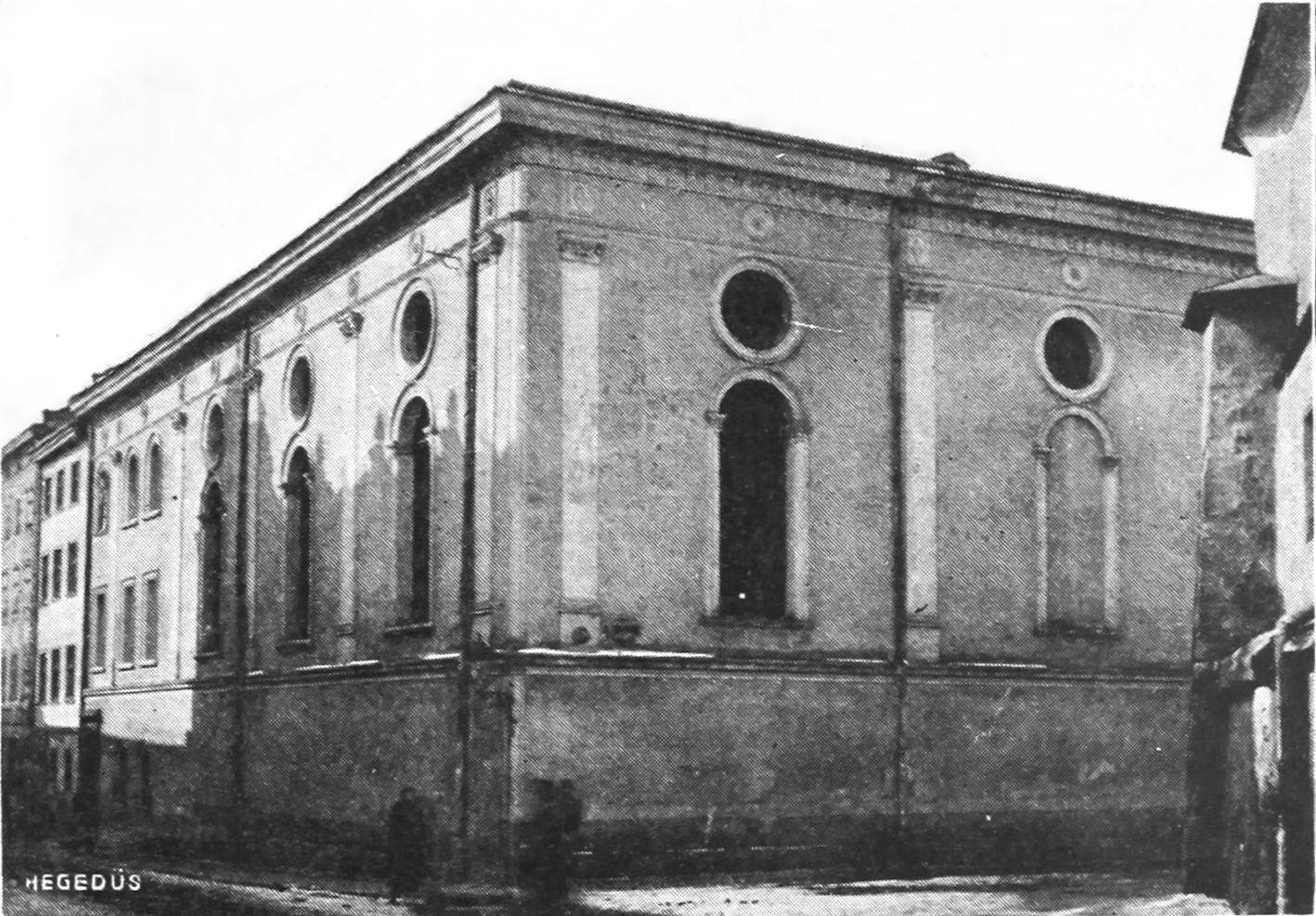 Большая городская синагога во Львове